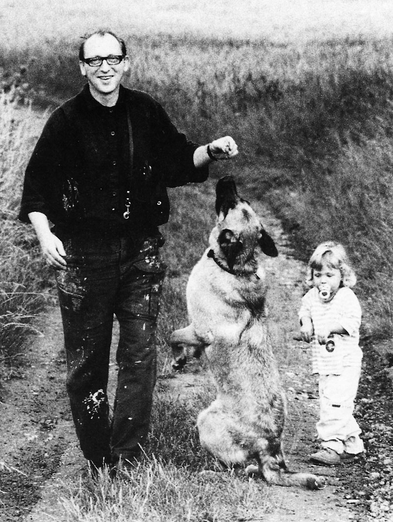 Jiři Keuthen mit seiner Tochter Maximiliane und Hund 1993 in Koblenz/Asterstein